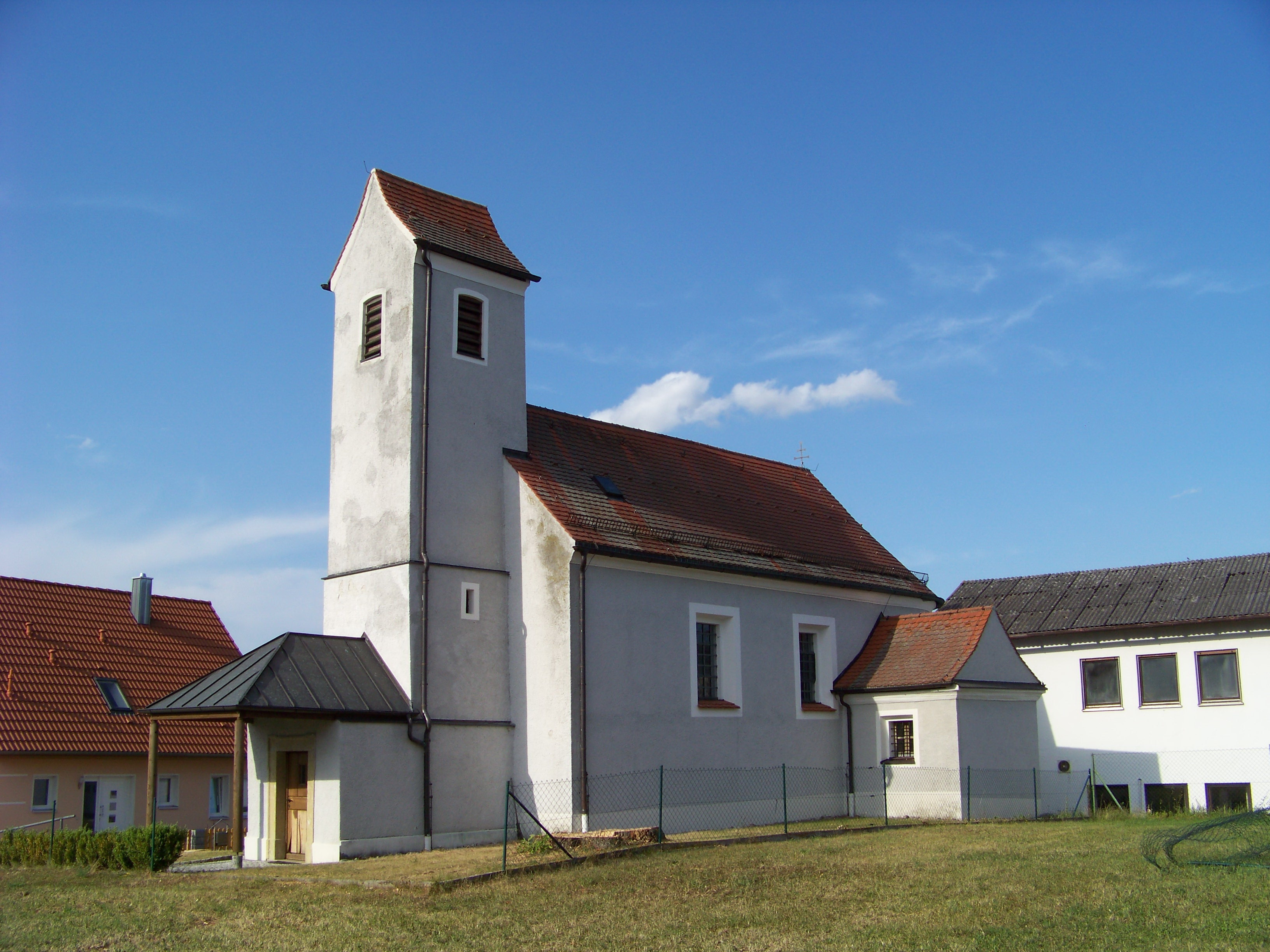 Thalmassing, Luckenpaint. Katholische Nebenkirche und ehem. Schlosskapelle St. Laurentius, traufständiger Saalbau mit eingezogener Apsis, westlichem Fassadenturm mit Satteldach und Vorzeichen, 17. Jahrhundert, im Kern romanisch.